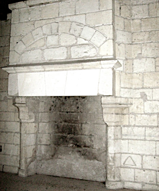 Cheminée de la tour de Guise (château de Tours) niveau IV